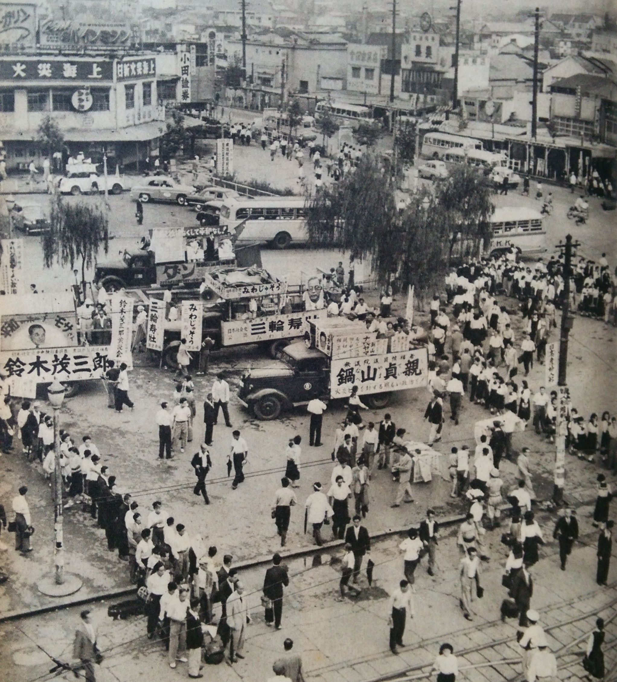 第25回衆議院議員総選挙に備え、渋谷駅前に集まる選挙カー